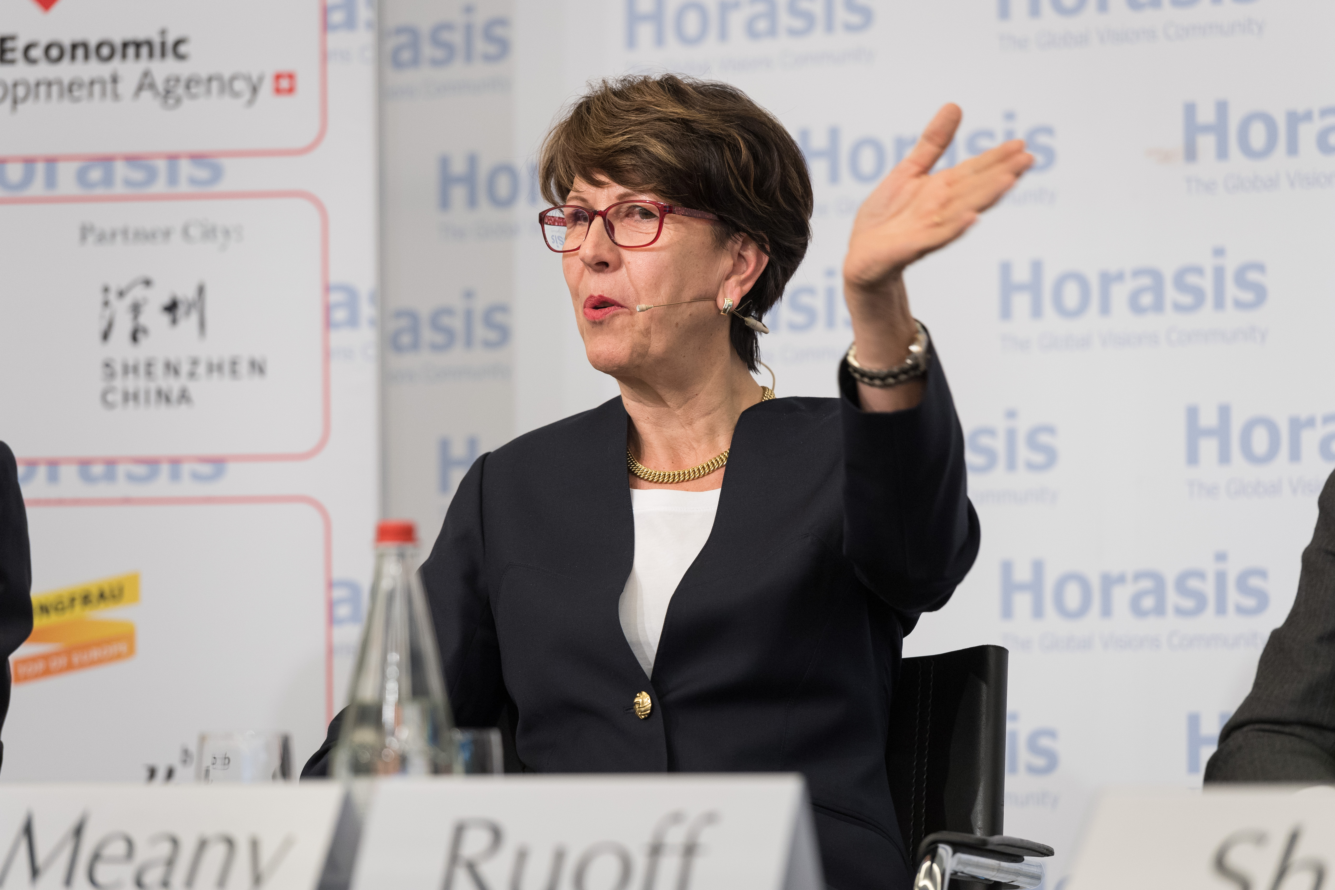 Horasis China Meeting, Interlaken, Switzerland, 7-8 November 2016